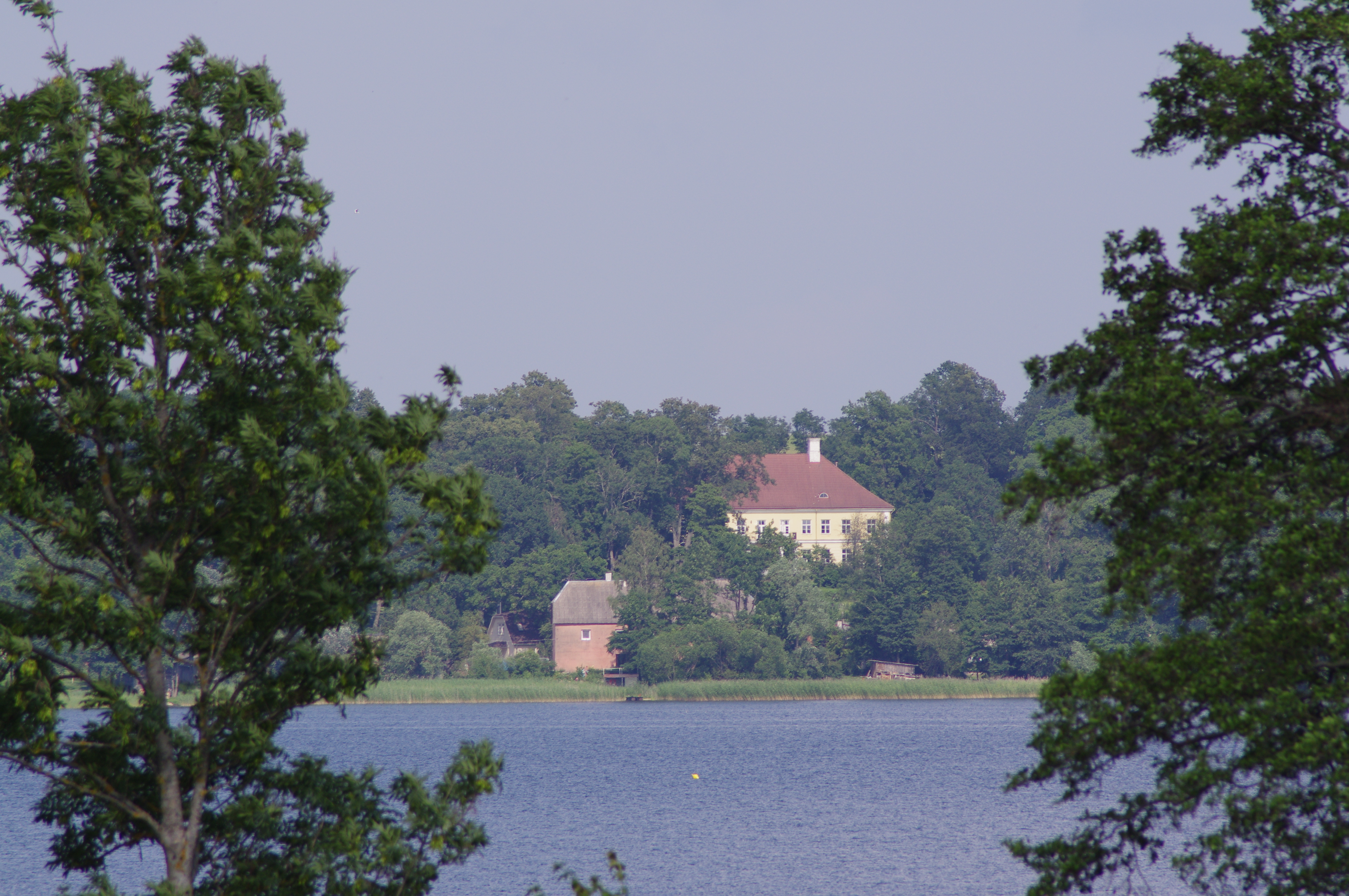 Saadjärve mõisasüda Saadjärve vastaskaldalt